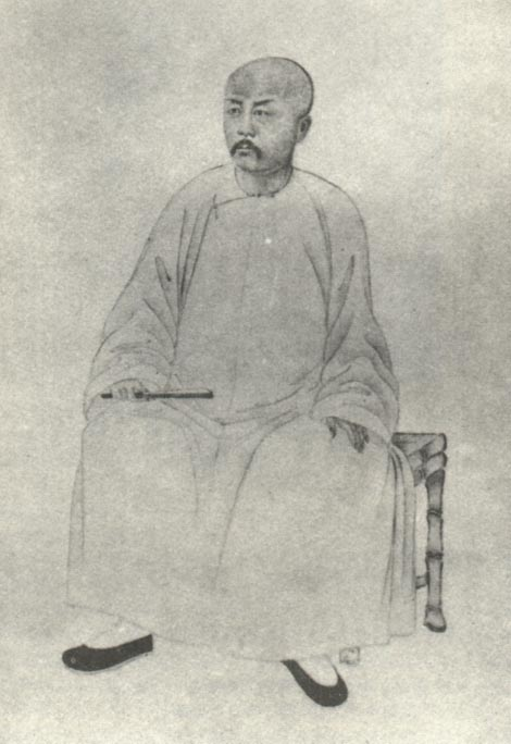 清代学者。Zhao Zhiqian